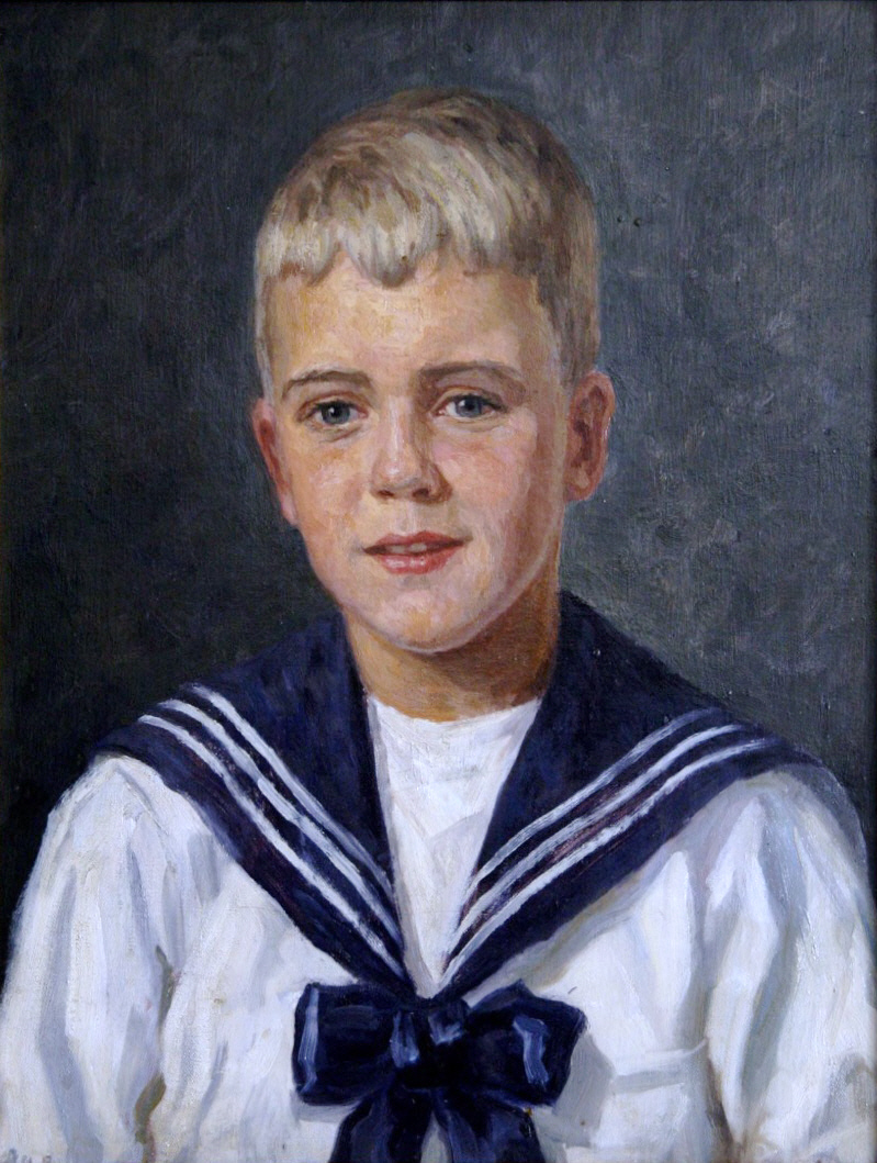 Brustbild eines Knaben im Seemanskostüm, Öl auf Leinwand, ca. 40 x 50,5 cm